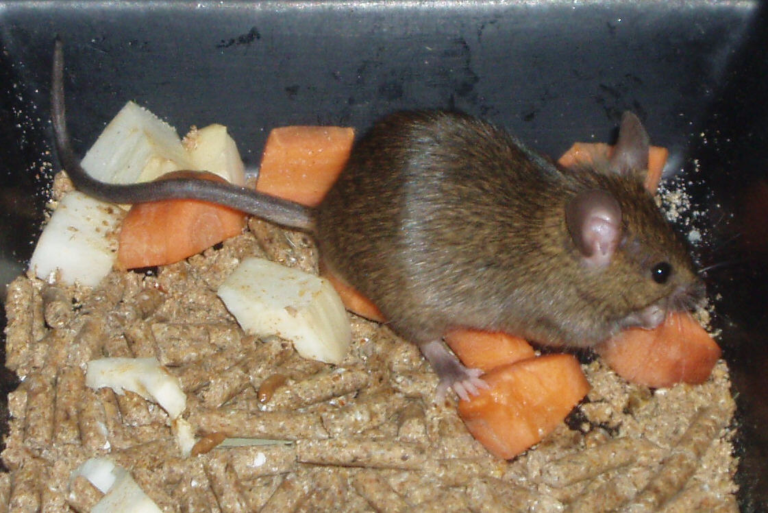 Maus